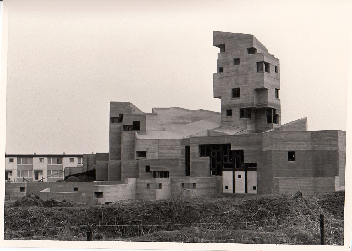 Die Friedenskirche Baumberg während der Bauphase; Ansicht von Osten (ca. 1970).